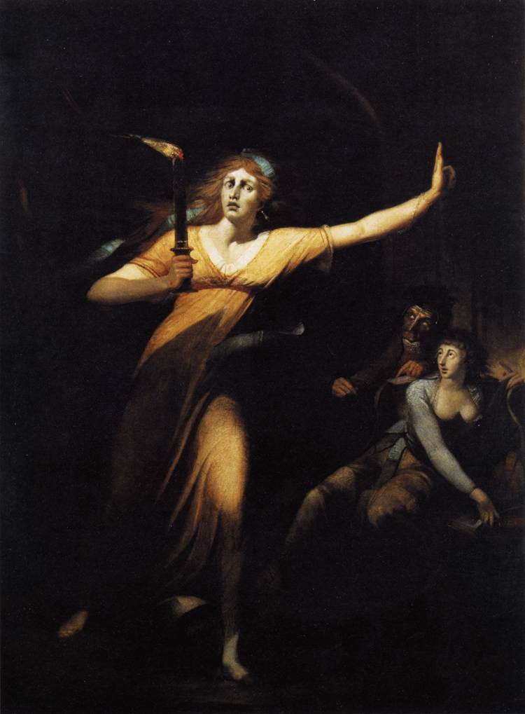 Übertragung einer Monolog-Situation aus Shakespeare's Tragödie